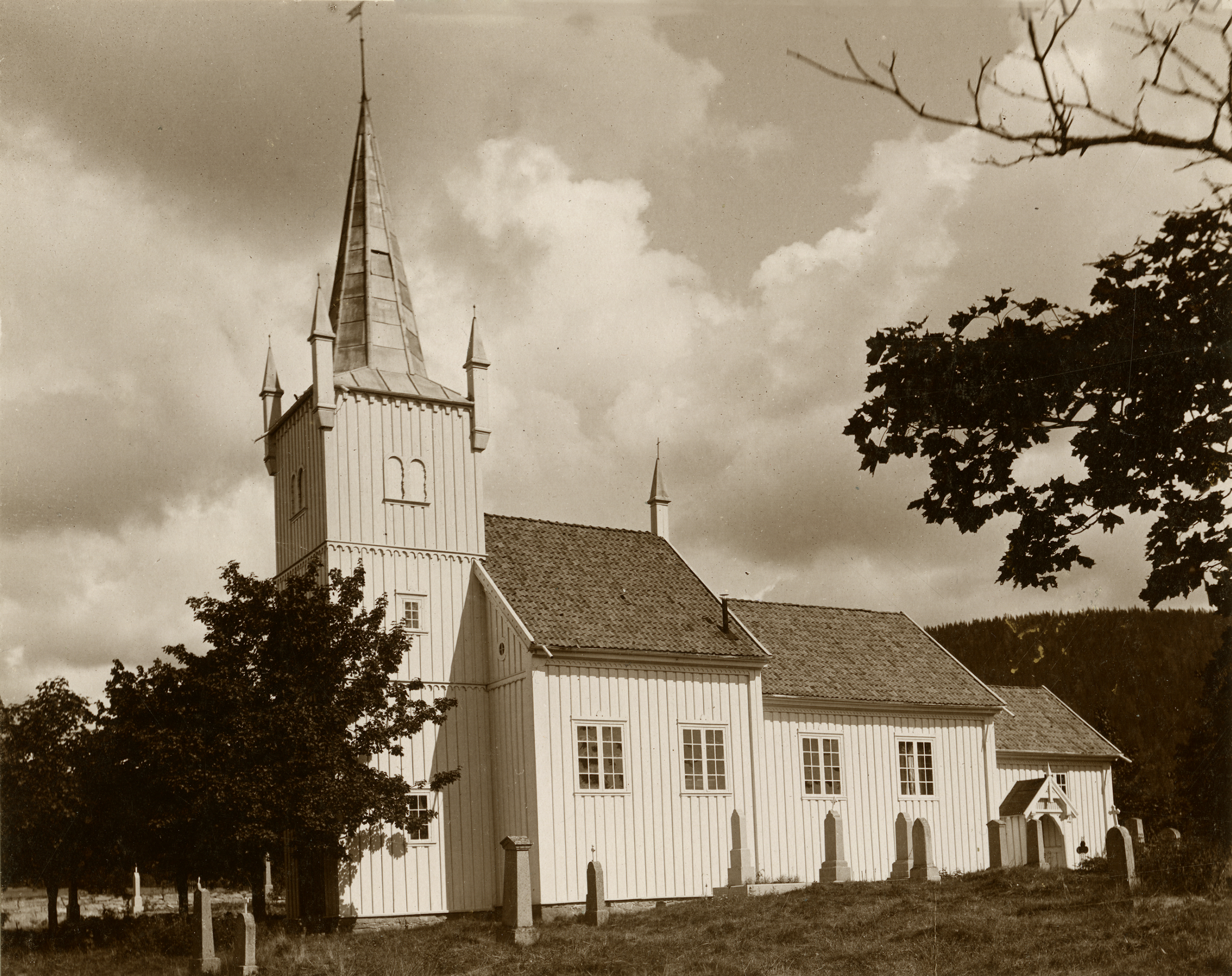 Hakadal kirke i Hakadal, Akershus This image on crowdsourcing geotagging platform Fotodugnad